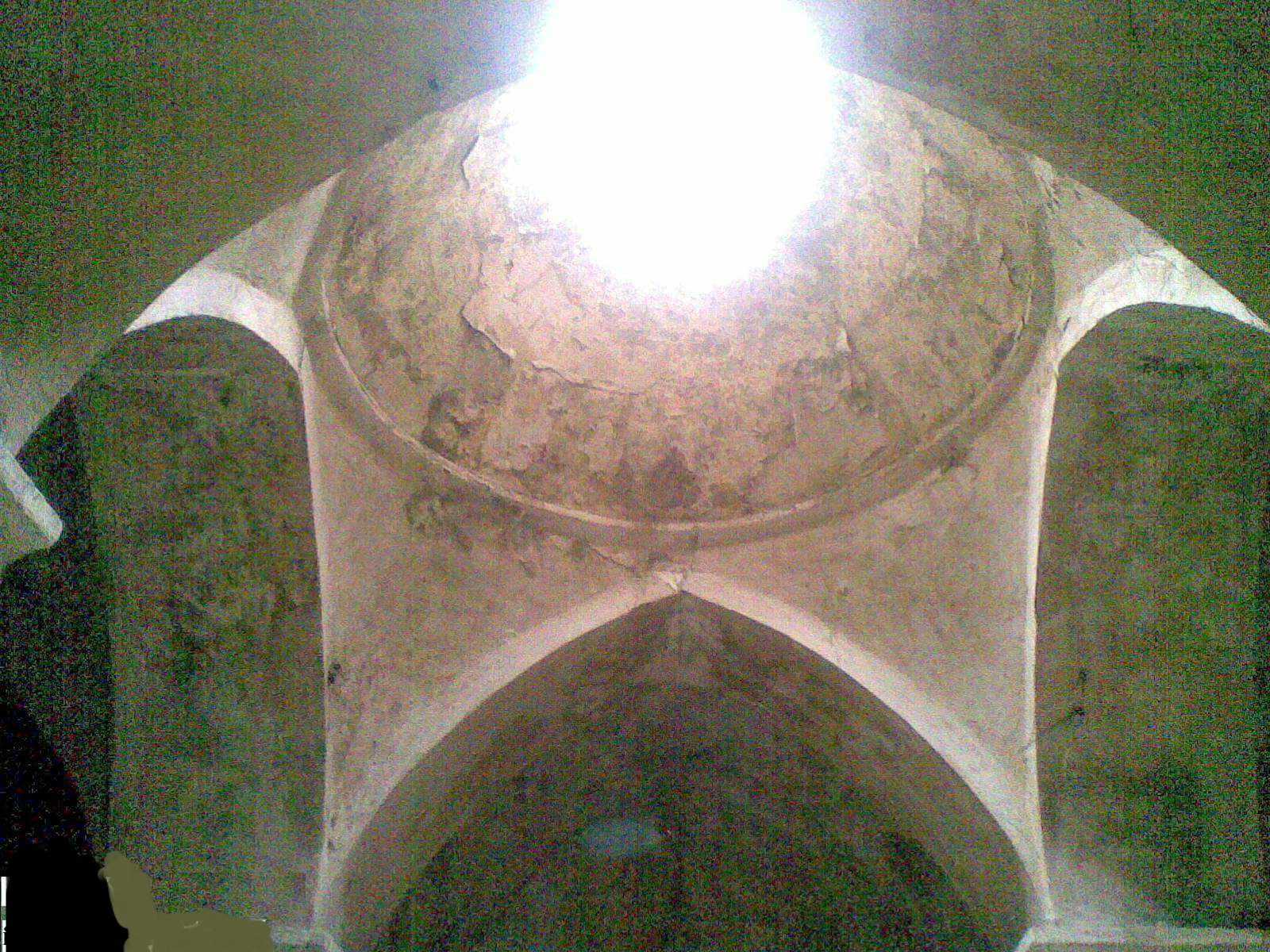 Hamamın iç görünüşü